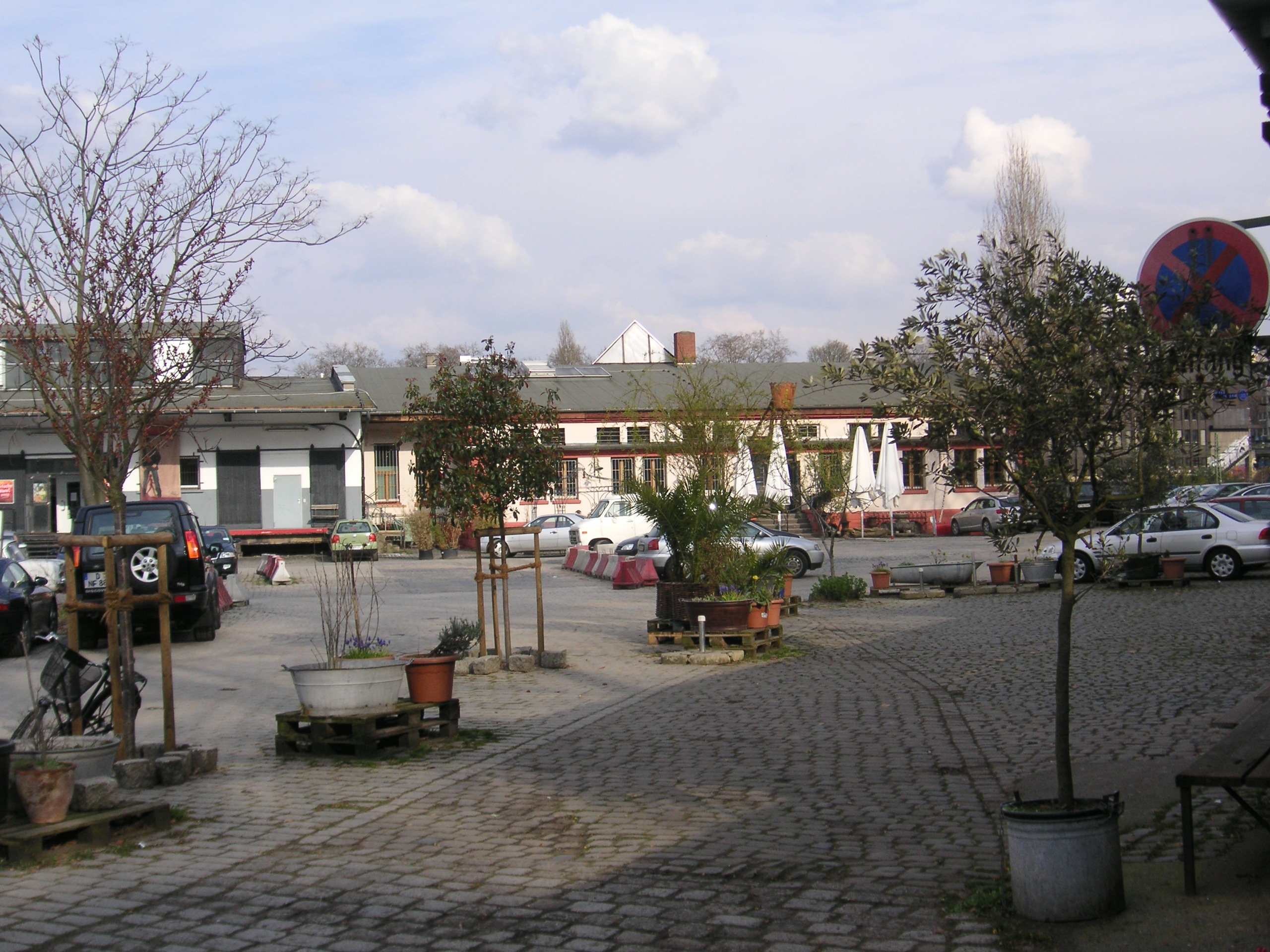 Düsseldorf-Pempelfort Güterbahnhof Derendorf, neues Café Les Halles